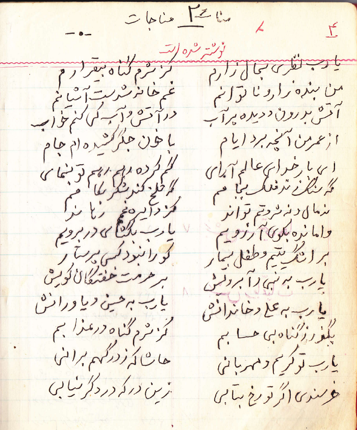 یکی از اشعار ایشان در موضوع مناجات نامه با دست خط خودشان